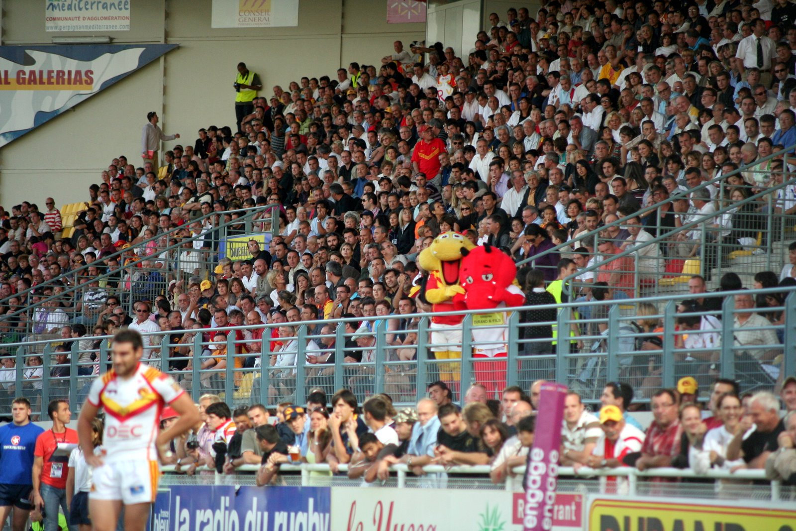 Tribune Bonzoms du stade Gilbert Brutus de Perpignan lors d'un match des Dragons Catalans.